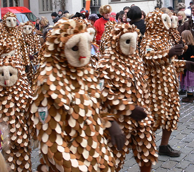 Narrensprung am Fasnetsmontag, 4. Februar 2008 in Ravensburg: Gehrenbergeulen der Narrenzunft Bitzenhofen-Oberteuringen